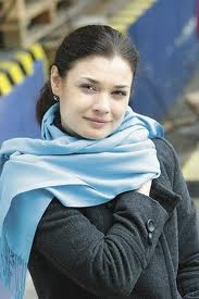 portret 4